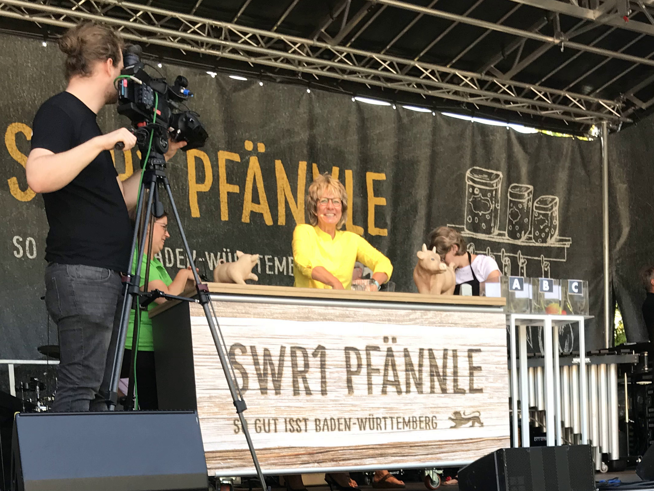 SWR1 Pfännle, eine Veranstaltung des Südwest Deutschen Rundfunks im alten Kapuziner Kloster in Haslach im Kinzigtal am 9. September 2018.